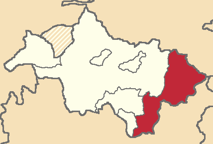 Mapa localizacor del cantón en Cañar, Ecuador